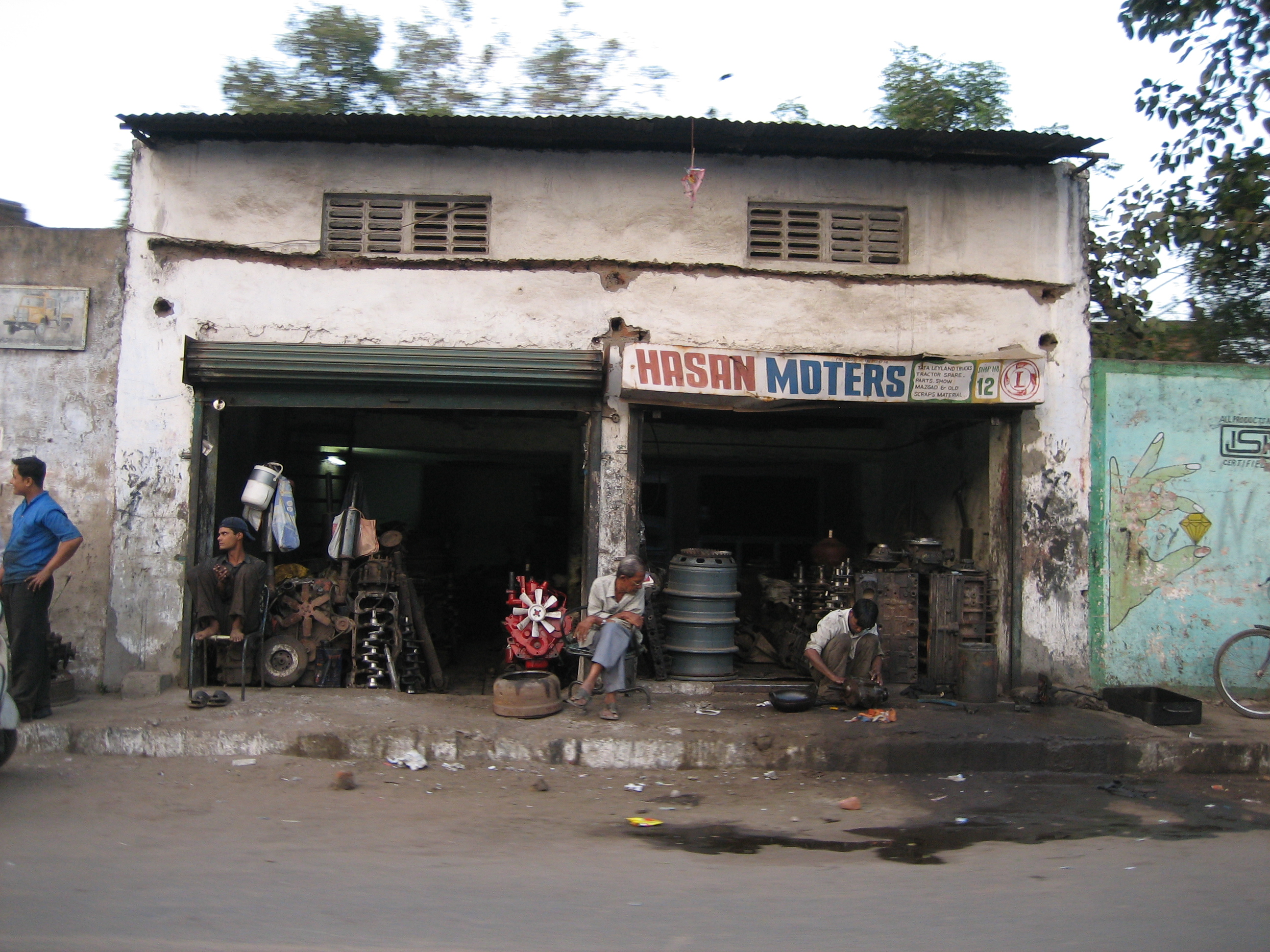 Sorgloser Umgang mit Gefahr- und Giftstoffen in Ahmedabad. Aufgenommen in der Altstadt von Ahmedabad 2007.